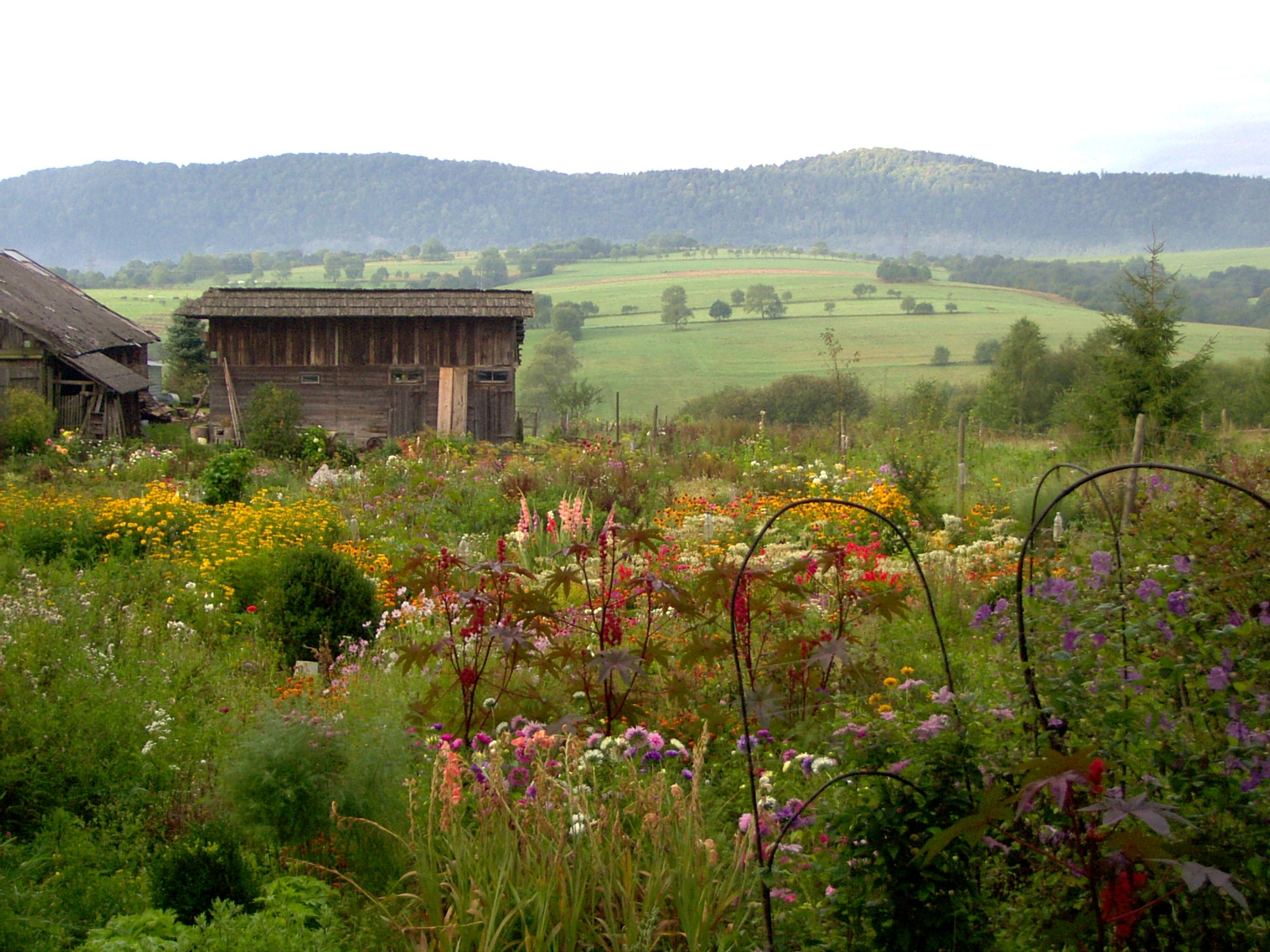 Blick über einen der im Sommer blumenreichen Bauerngärten im Hauptort von Lutowiska in die reich gegliederte Landschaft.